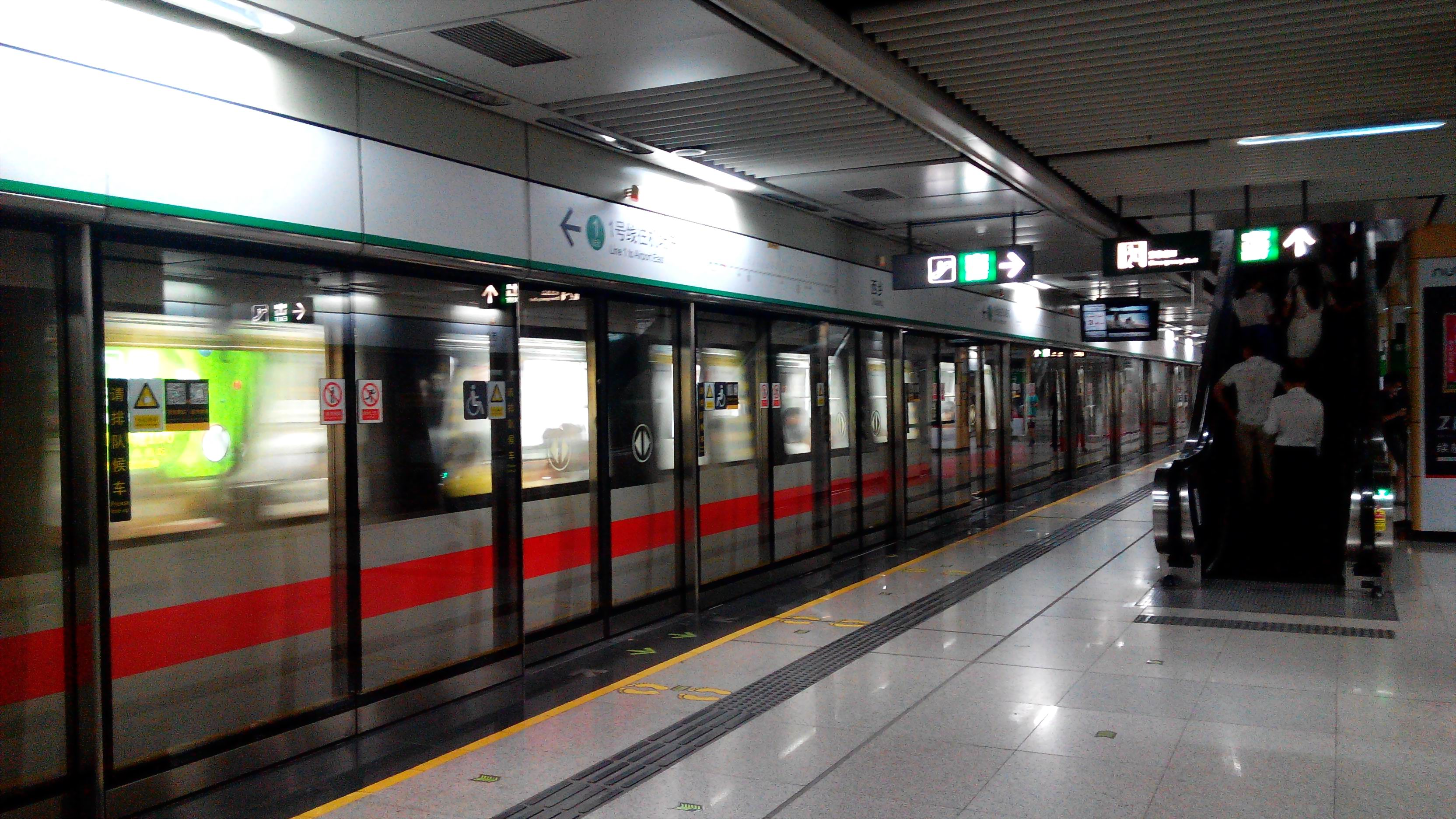 深圳地铁1号线 西乡站 1号站台